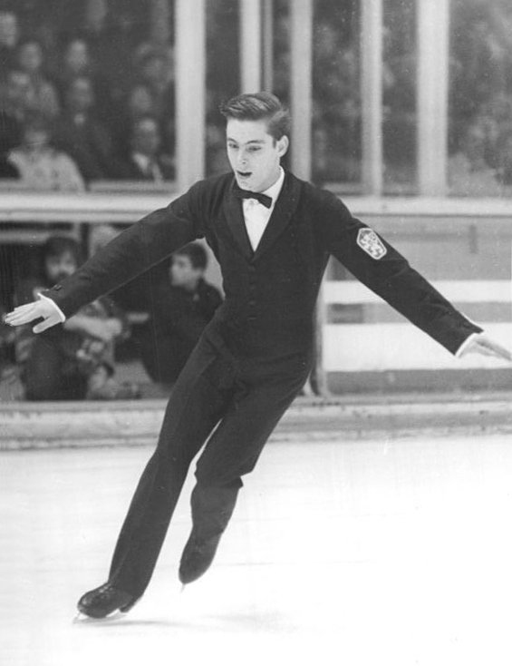 Ondrej Nepela ADN-ZB Gahlbeck 29.11.72 Berlin: UdSSR 50 - ADN-Umfrage unter Spitzensportlern sozialistisher Länder. Ondrej Nepela (CSSR), Olympiasieger und zweifacher Weltmeister im Eiskunstlauf. Foto von einem früheren Wettkampf (siehe ADN-Meldungen vom 28.11.1972)